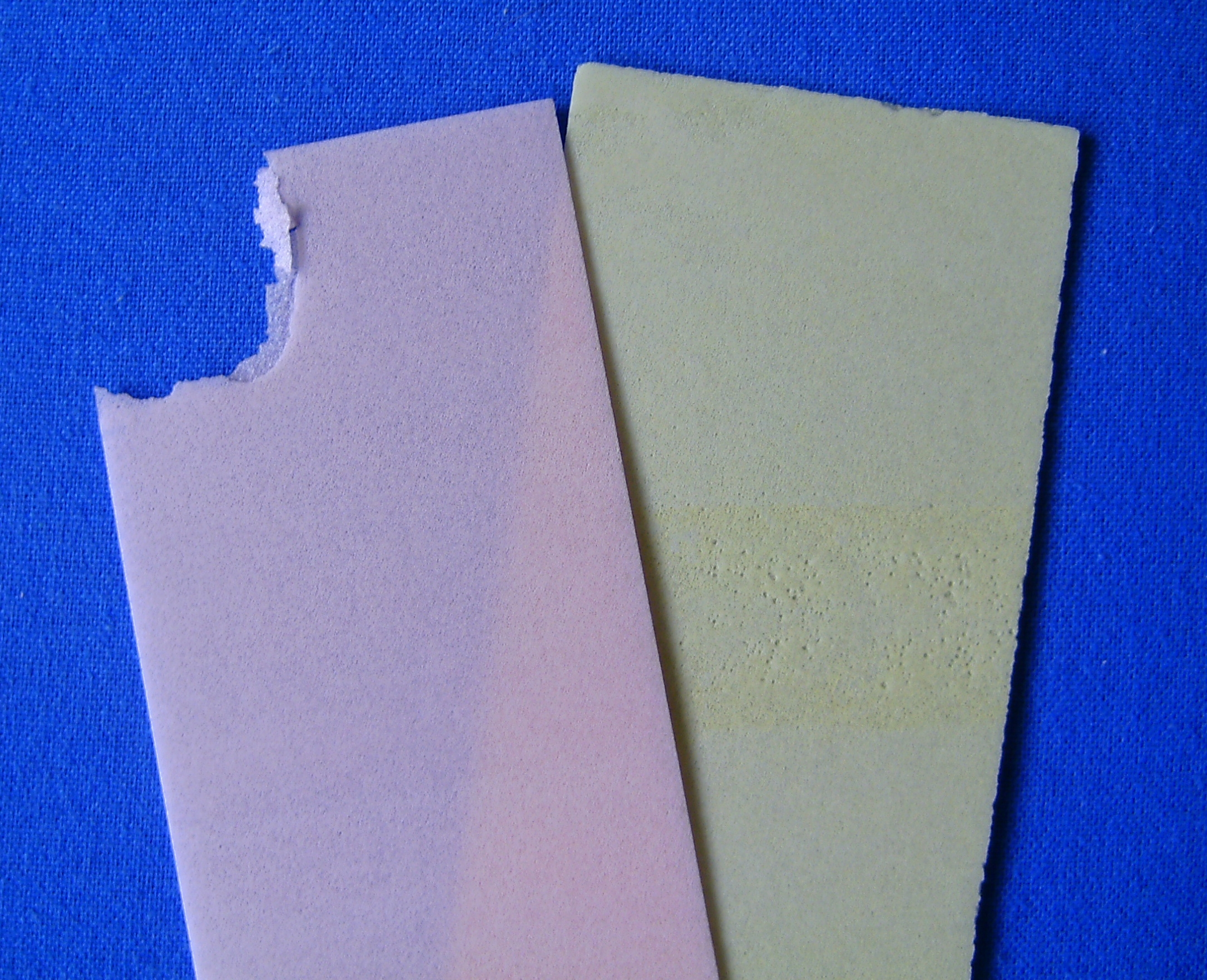 Esspapier /Oblaten, edible paper